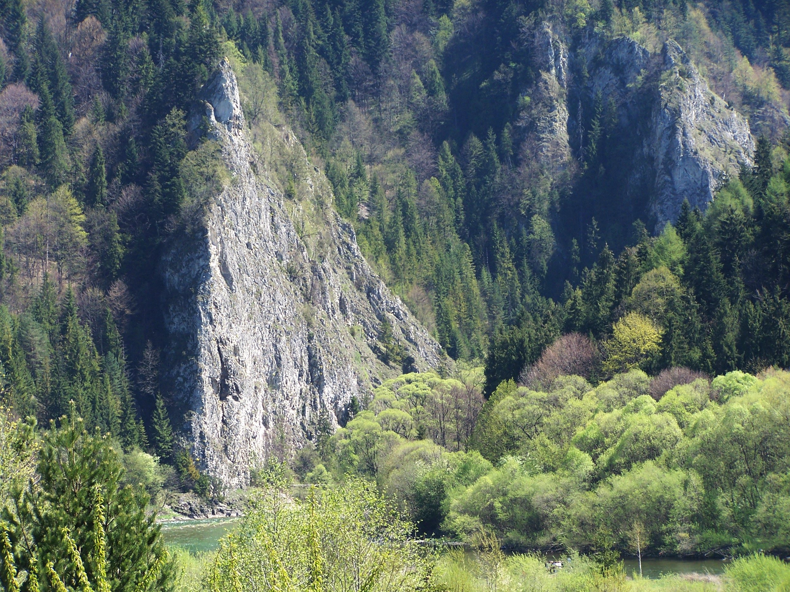 Ostra Skała (Przełom Dunajca)